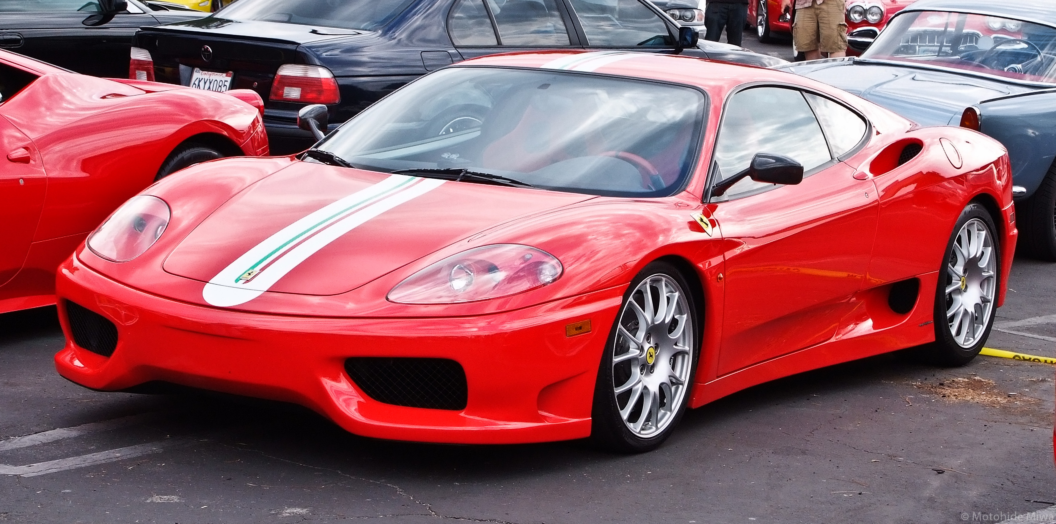 SupercarSunday-79